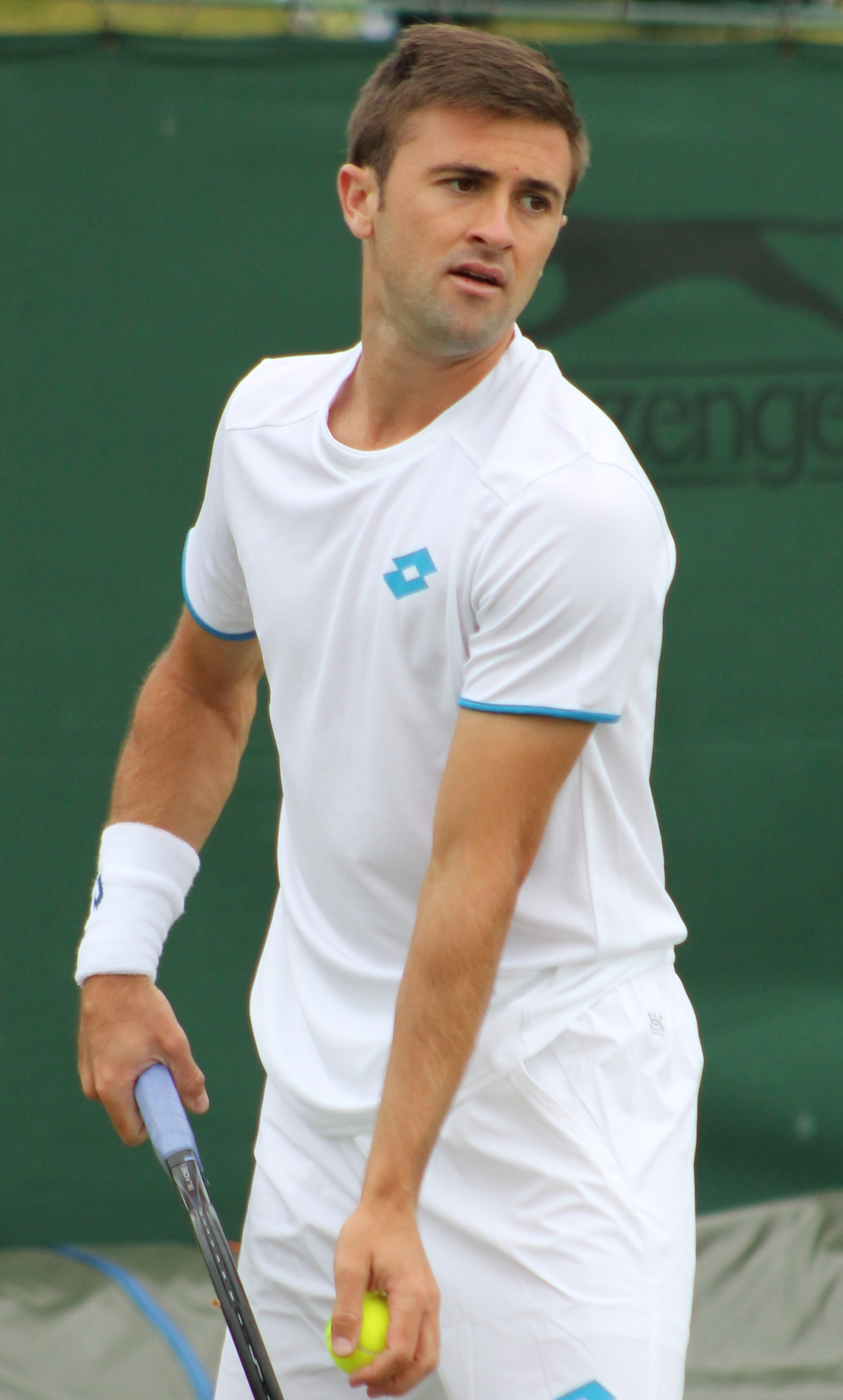 Smyczek WMQ14 (8)